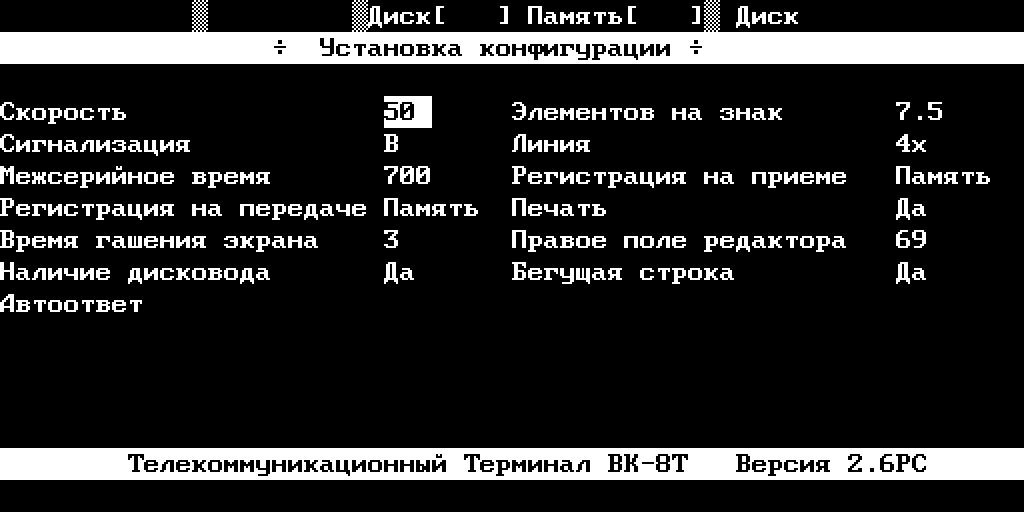 Скриншот экрана Абонентской телеграфной установки «Телекоммуникационный терминал ВК-8Т», созданной на базе модификации «Корвета» — «Кванта-8».